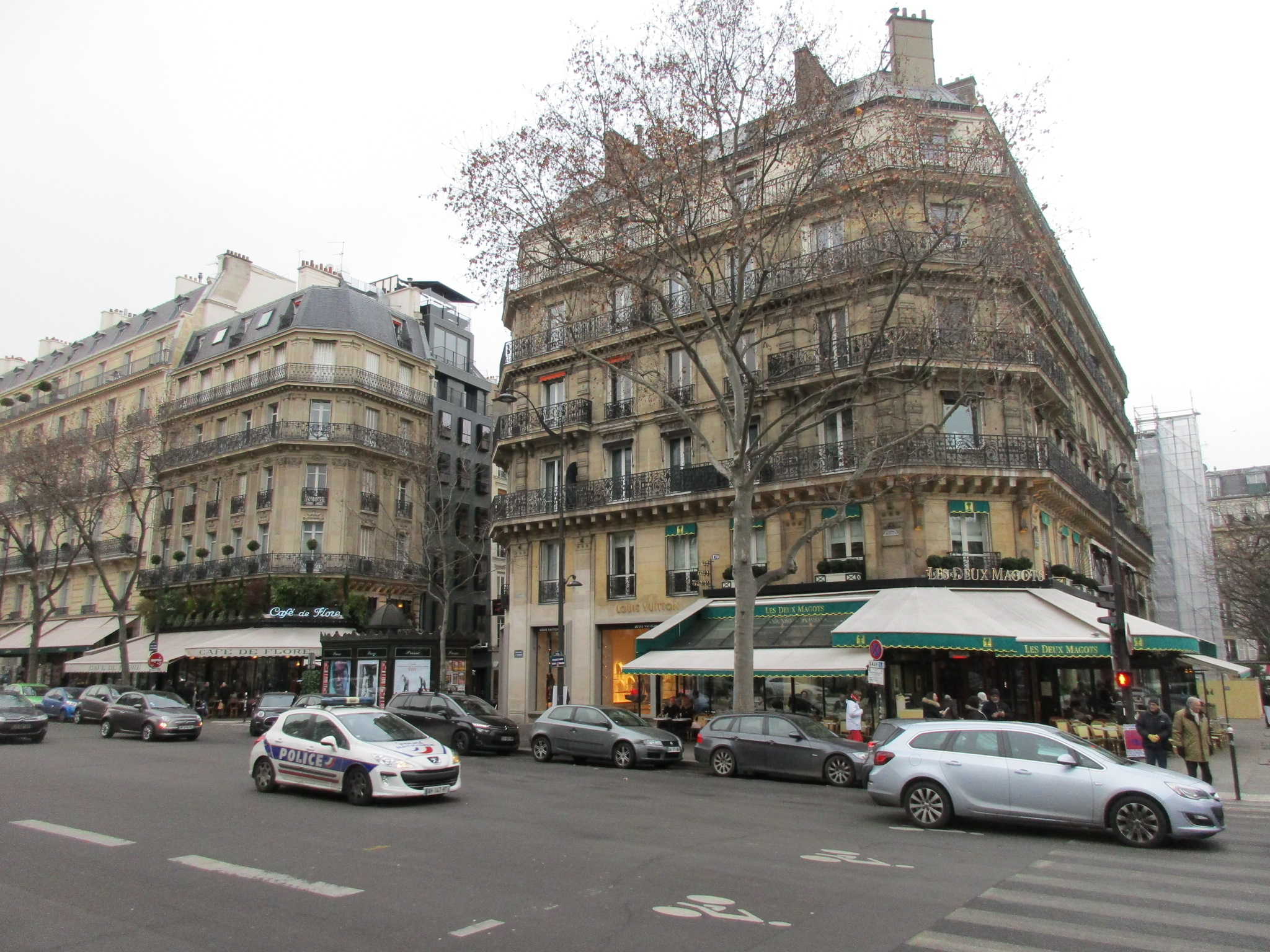 Café de Flore et Les Deux Magots